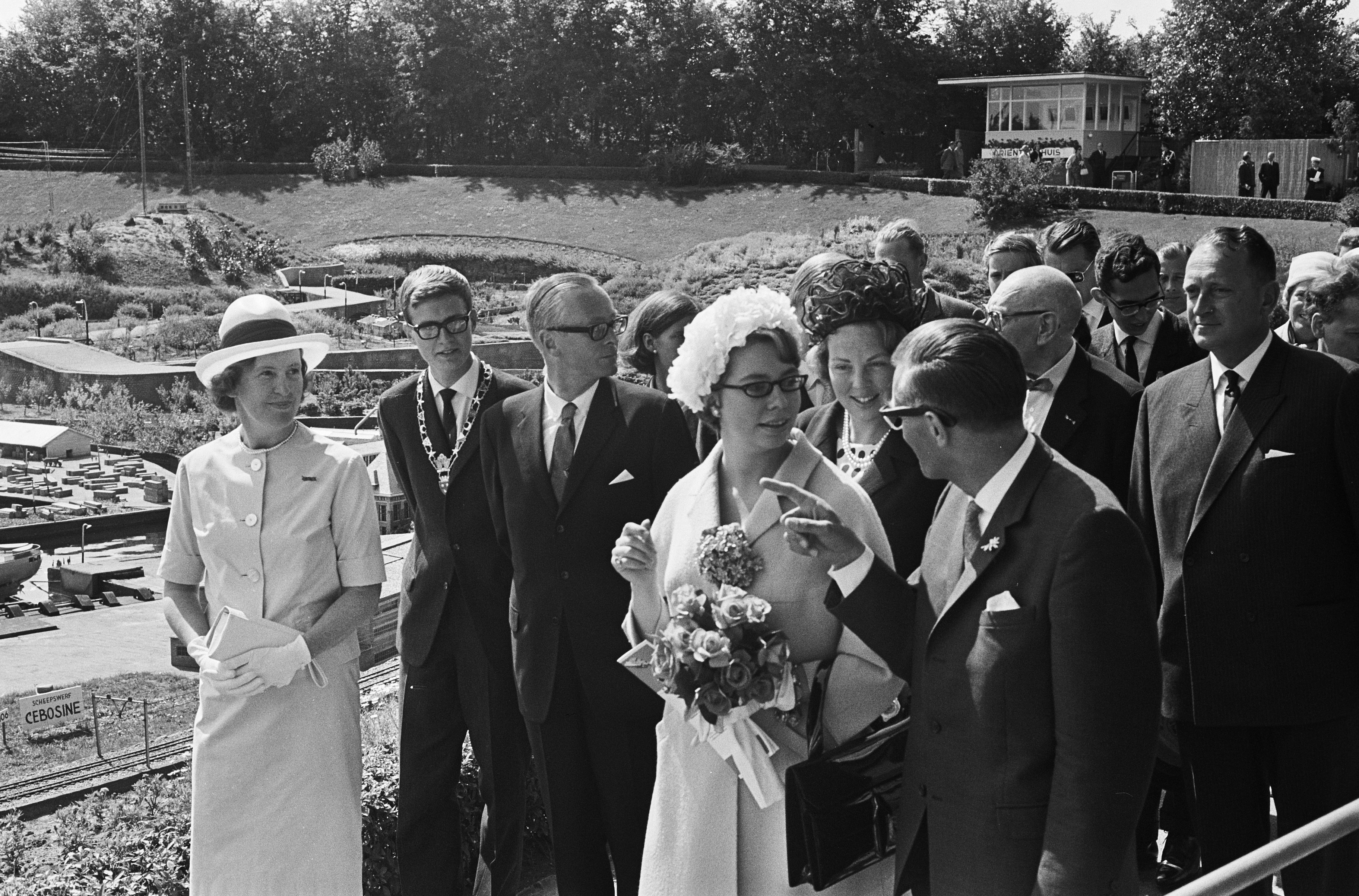 Collectie / Archief : Fotocollectie Anefo Reportage / Serie : [ onbekend ] Beschrijving : In aanwezigheid van prinses Beatrix heeft prinses Christina van Zweden een tentoonstelling van Zweeds beeldhouwwerk geopend in Madurodam. Vlnr. mevr. Luns, Hans Wijnstok (loco-burgemeester van Madurodam), Brynof Eng (ambassadeur van Zweden), prinses Christina, prinses Beatrix en de directeur van Madurodam G.G. Jungerius Datum : 15 juni 1964 Locatie : Den Haag, Madurodam Trefwoorden : attractieparken, bezoeken, diplomaten, prinsessen, tentoonstellingen Persoonsnaam : Beatrix, prinses, Christina, prinses, Eng Brynol, Jungerius G.G., Luns, J.A.M.H., Luns, Joseph, Wijnstok H. Fotograaf : Pot, Harry / Anefo Auteursrechthebbende : Nationaal Archief Materiaalsoort : Negatief (zwart/wit) Nummer archiefinventaris : bekijk toegang 2.24.01.05 Bestanddeelnummer : 916-5447